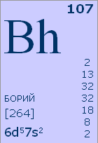 Боррий